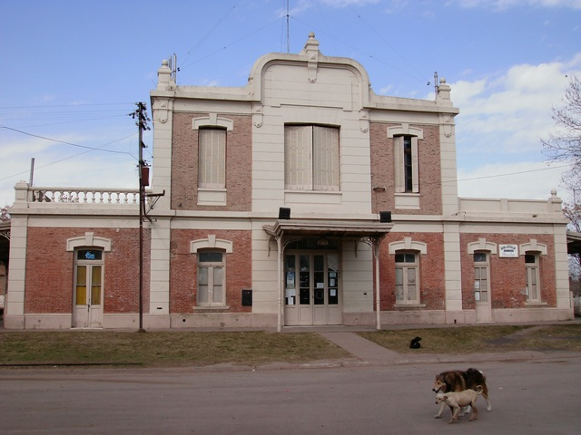 Estacion Villars.